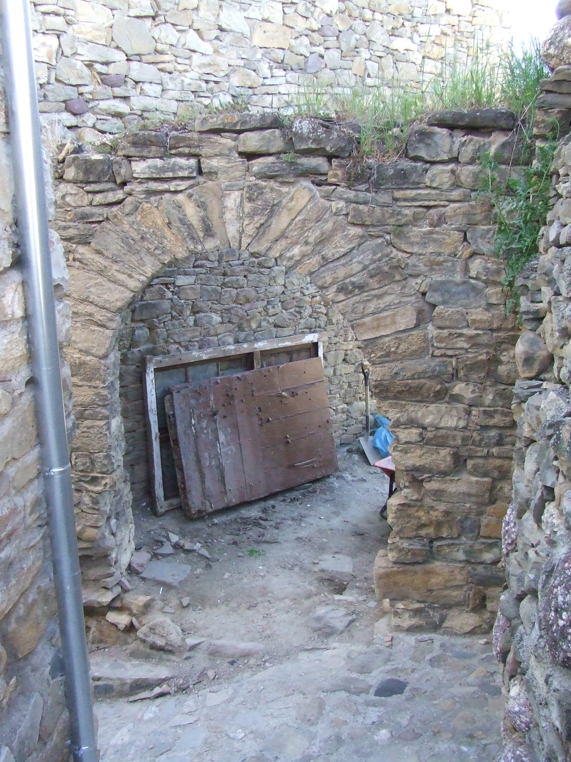 Antic portal d'entrada a Torallola, avui abandonat (Toralla i Serradell, Conca de Dalt, Pallars Jussà)